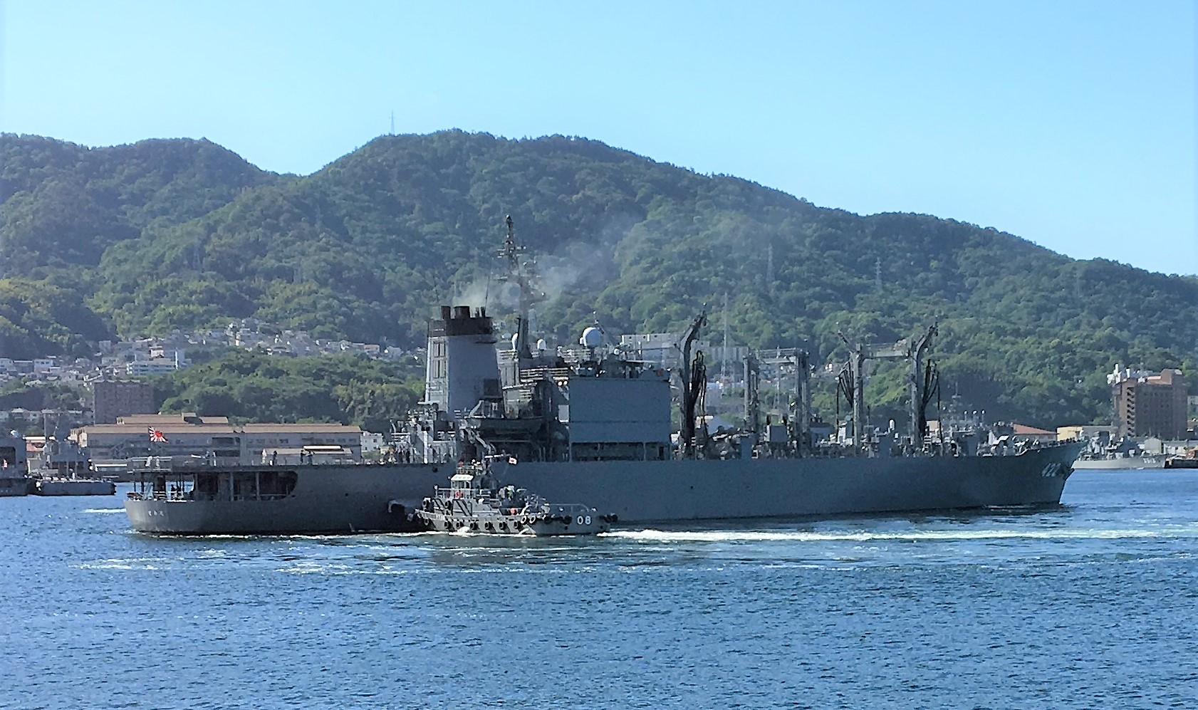 海上自衛隊呉基地でタグボートに押されて移動中の補給艦とわだ。